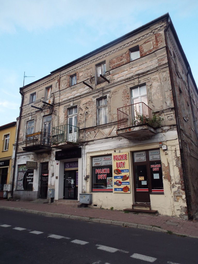 Hrubieszów, pl. Wolności 7